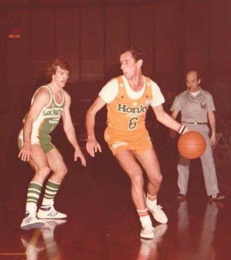 Massimo Casanova nella partita Fabriano - Rimini della stagione 1980-1981